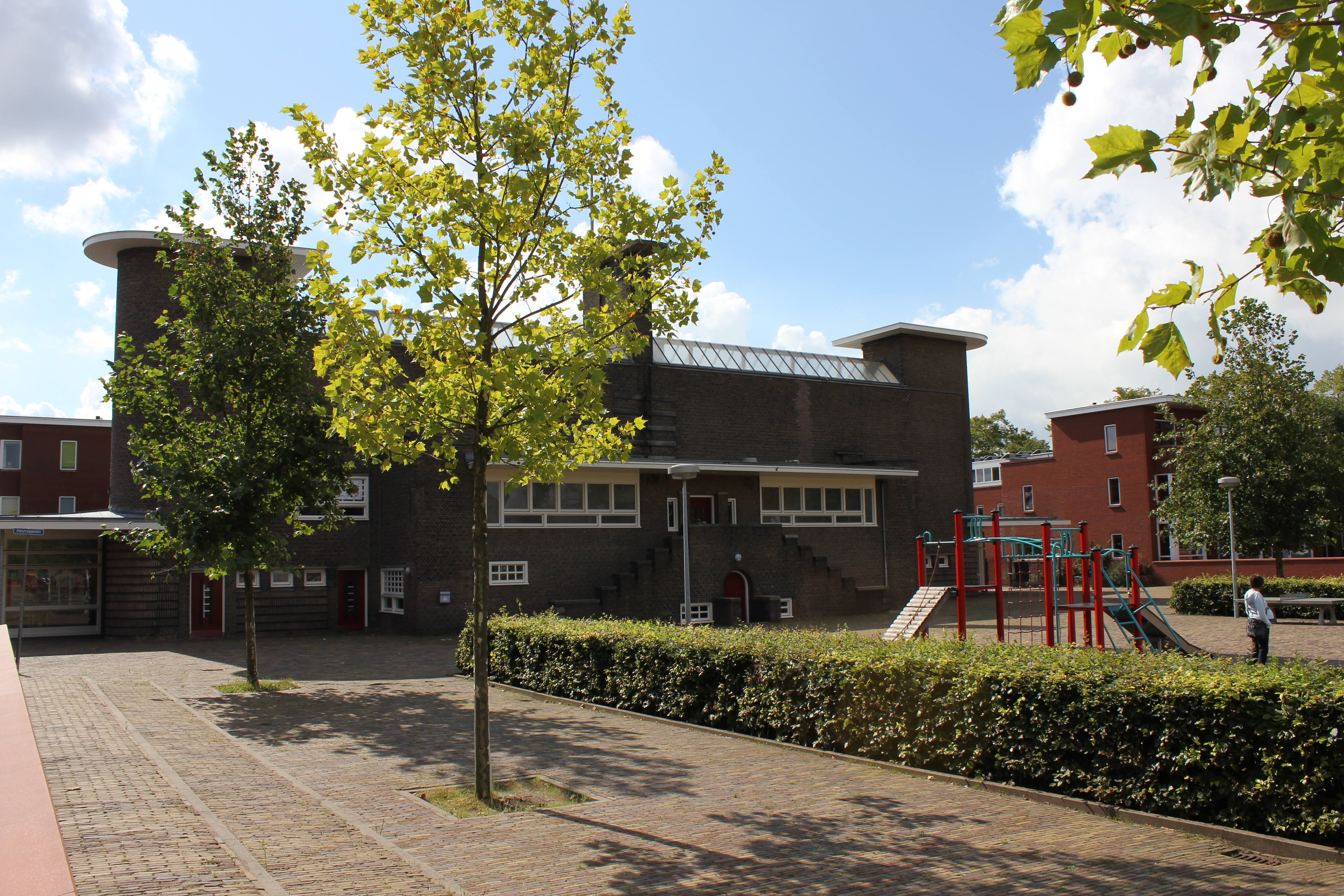 OBS de Kleine Dichter ( Heycopplein 1 Utrecht NL.